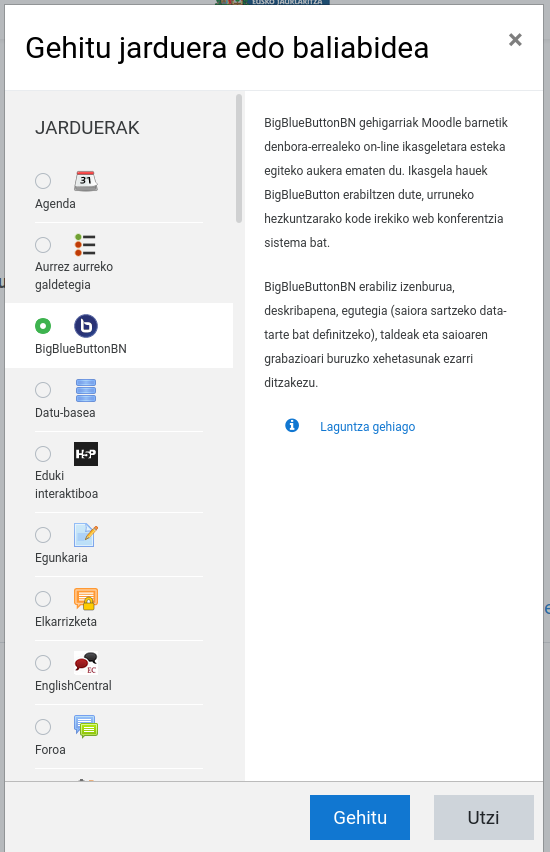 BigBlueButton Moodlen integratzeko aukera.